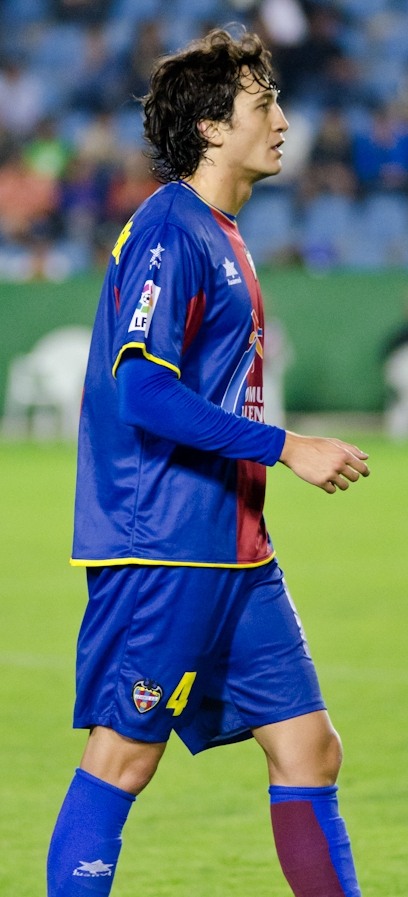 El jugador granota Héctor Rodas